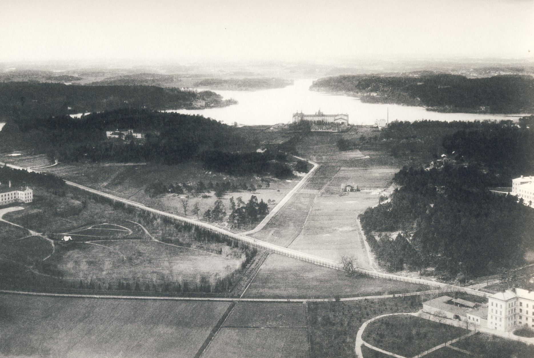 Kungsholmen från luftballong fotograferat mot nordväst år 1894 eller 1896, i bakgrunden syns det nybyggda "Stora Bryggeriet" vid Ulvsundasjön